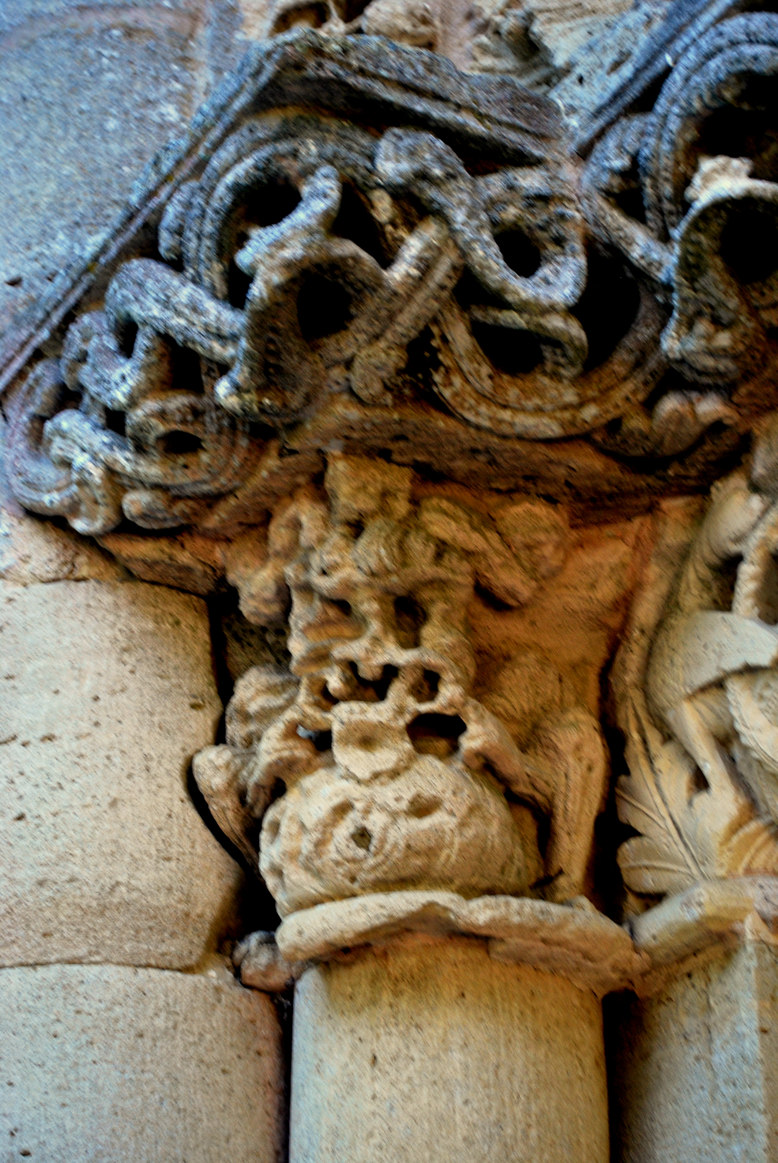 Blasimon église St Nicolas portail